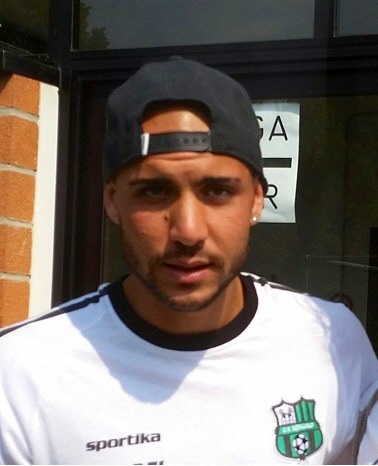 Simone Zaza nel 2014.